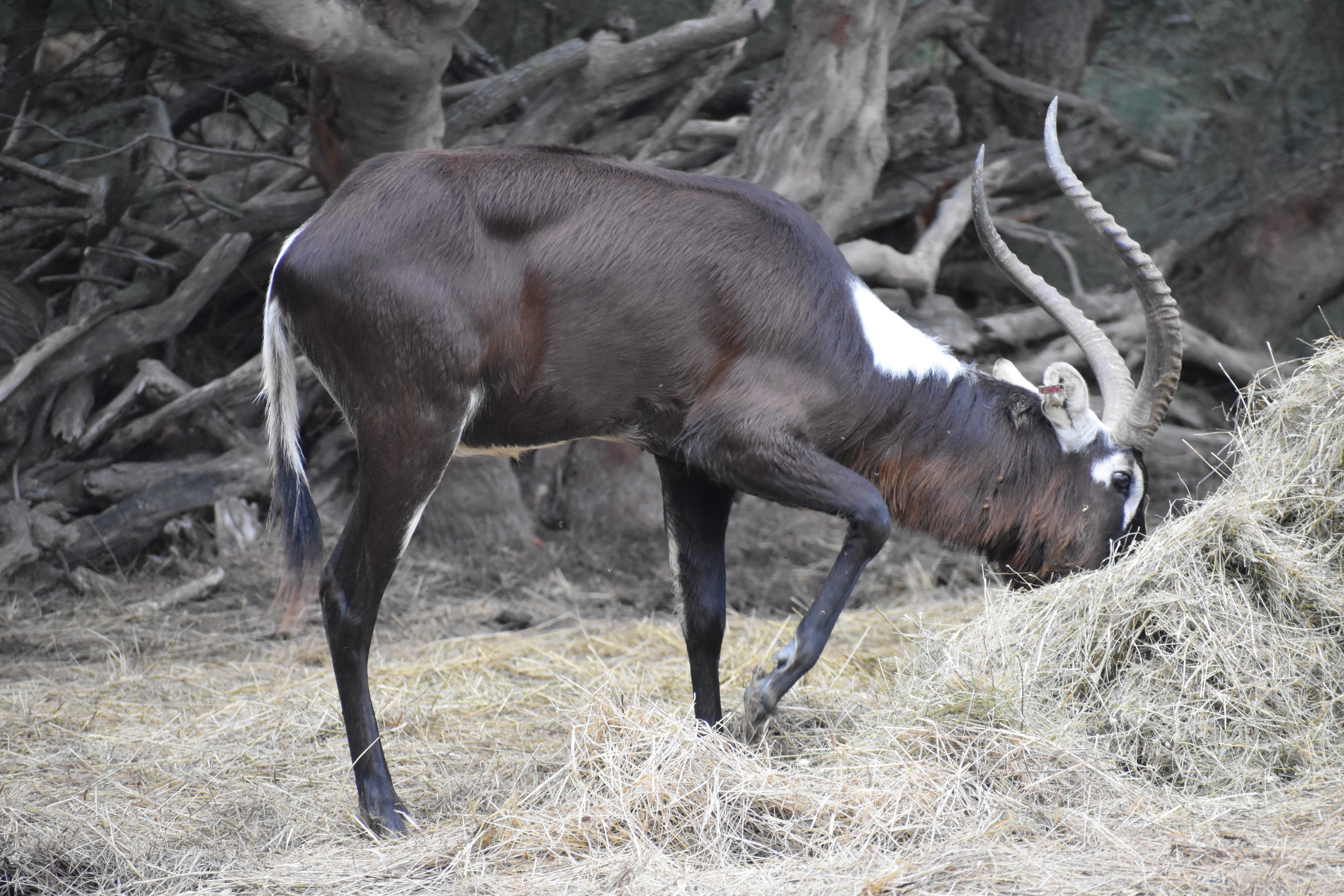 Cobe de Mrs Gray dans la Réserve de Sigean.